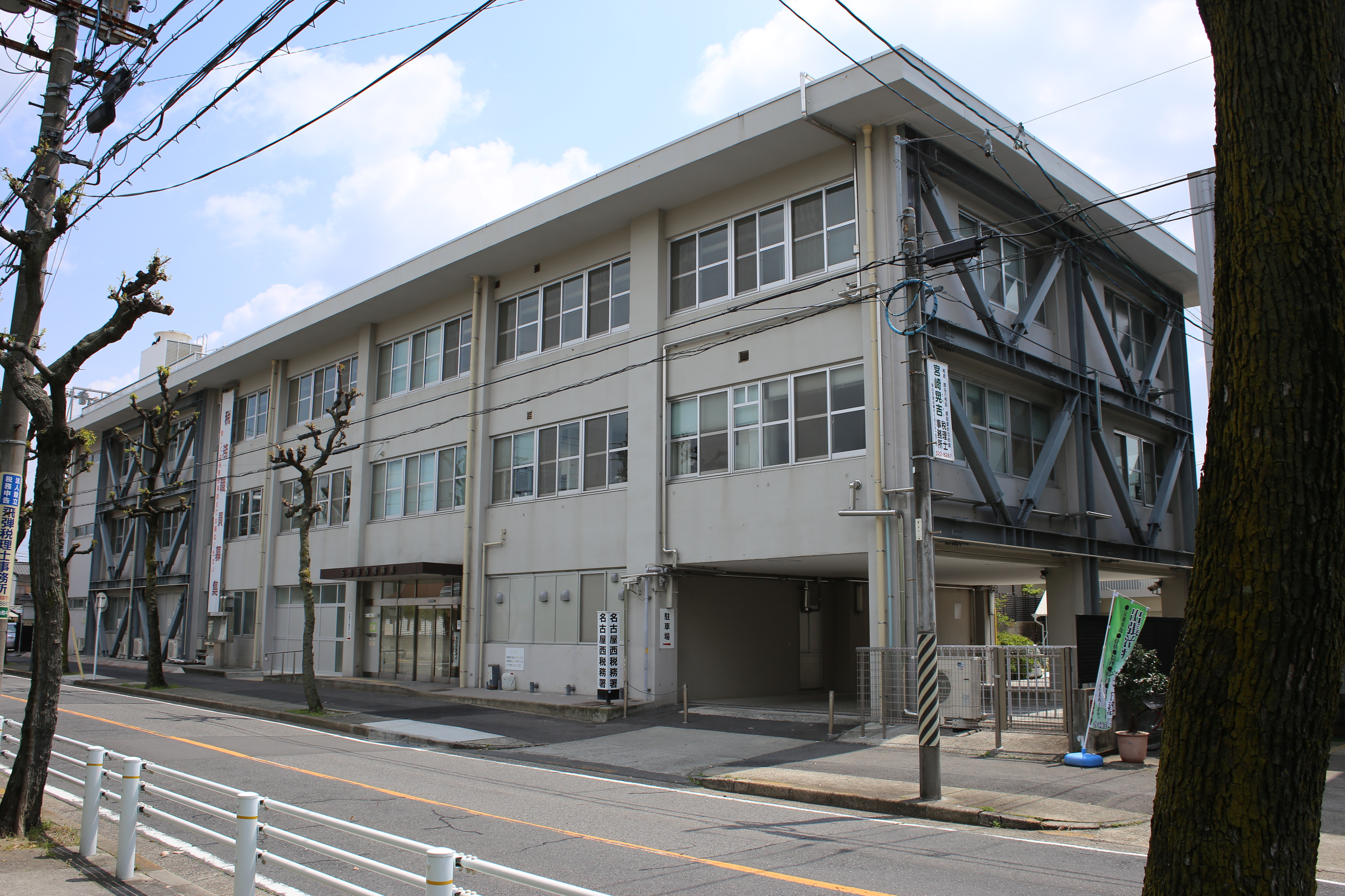 名古屋市西区押切二丁目の名古屋西税務署を北側公道西側より撮影